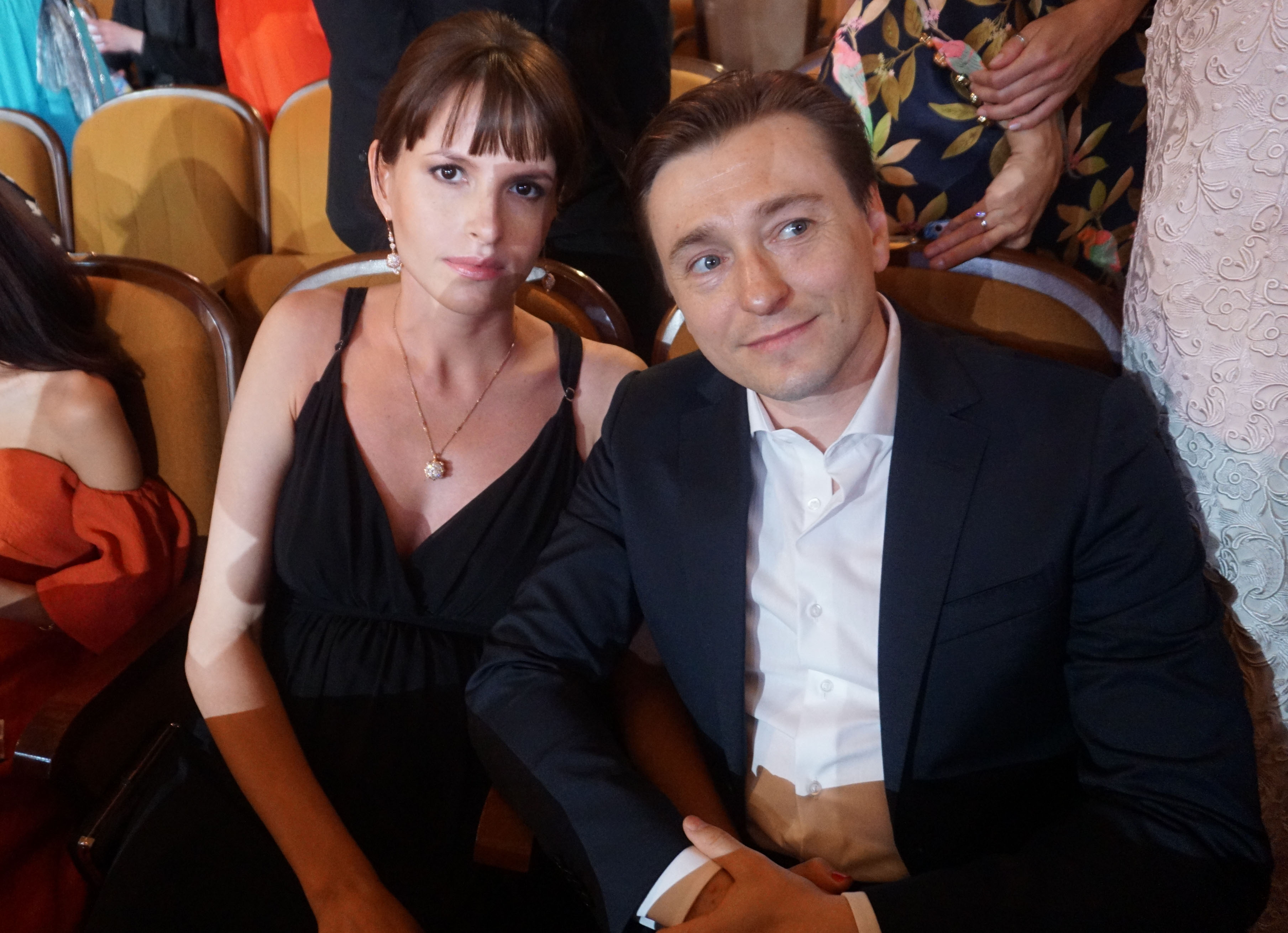 Анна Матисон и Сергей Безруков. Кинотавр, Сочи, 2016